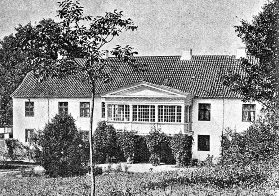 Haraldslund er en herregård,der ligger i Grundfør Sogn i Vester Lisbjerg Herred. Er kendt fra jordebøgerne fra 1300-tallet. Harrildsmark, en ødegårdsjord, blev i 1661 udlagt til Gabriel Marselis.